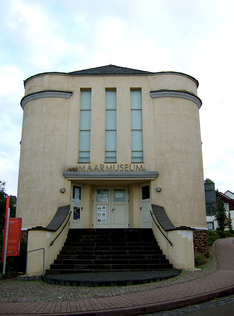 Maarmuseum in Manderscheidt